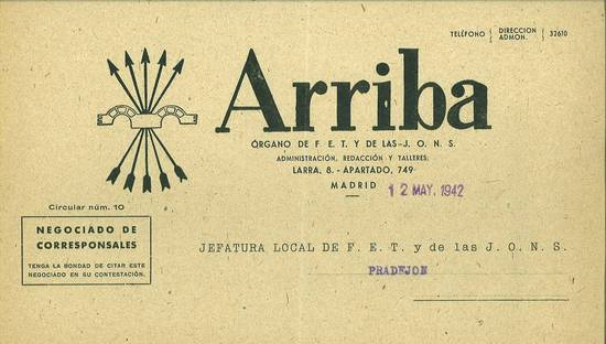 Carta del semanario falangista Arriba, indicando el envío de cinco ejemplares a Pradejón, con el fin de captar nuevos lectores entre los vecinos.